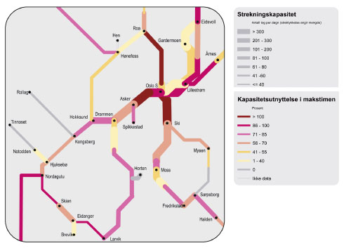 Togtrafikk i Oslo / Train trafic in Oslo